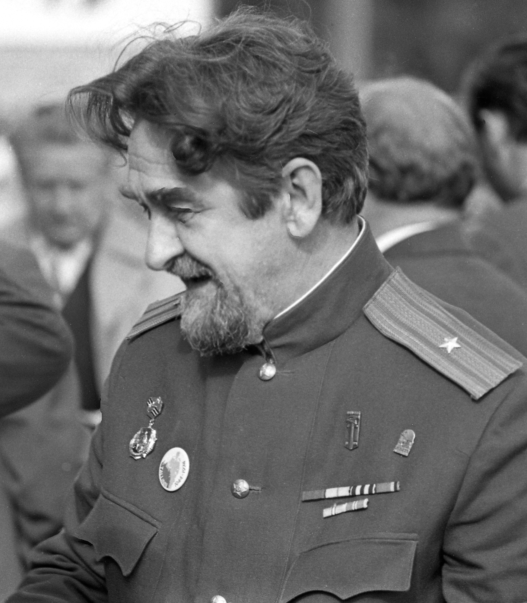 Hardi Tiidus